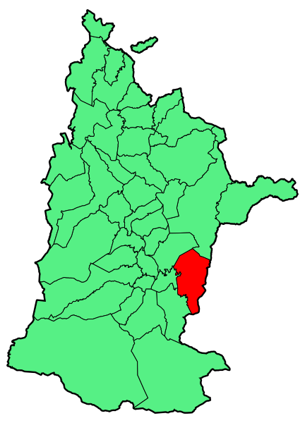 Aipaturiko udalerriaren kokapena Zuberoan